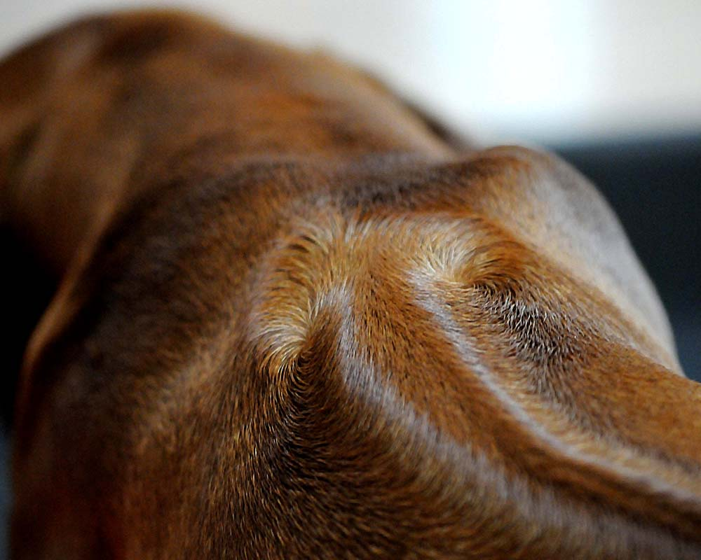 Detalle de la cresta o Ridge de un Rhodesian Ridgeback